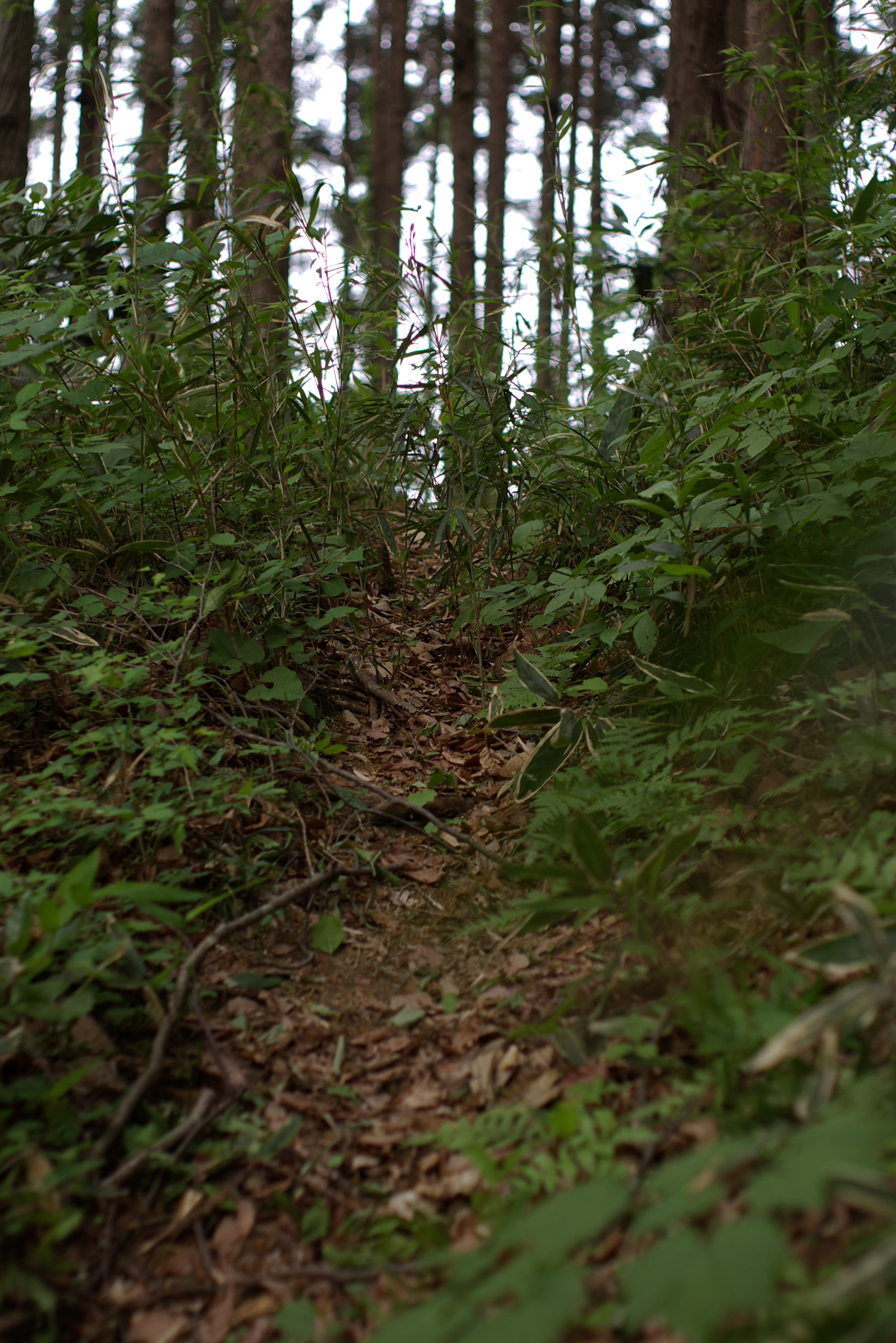 けもの道。近くの森の公園にて。